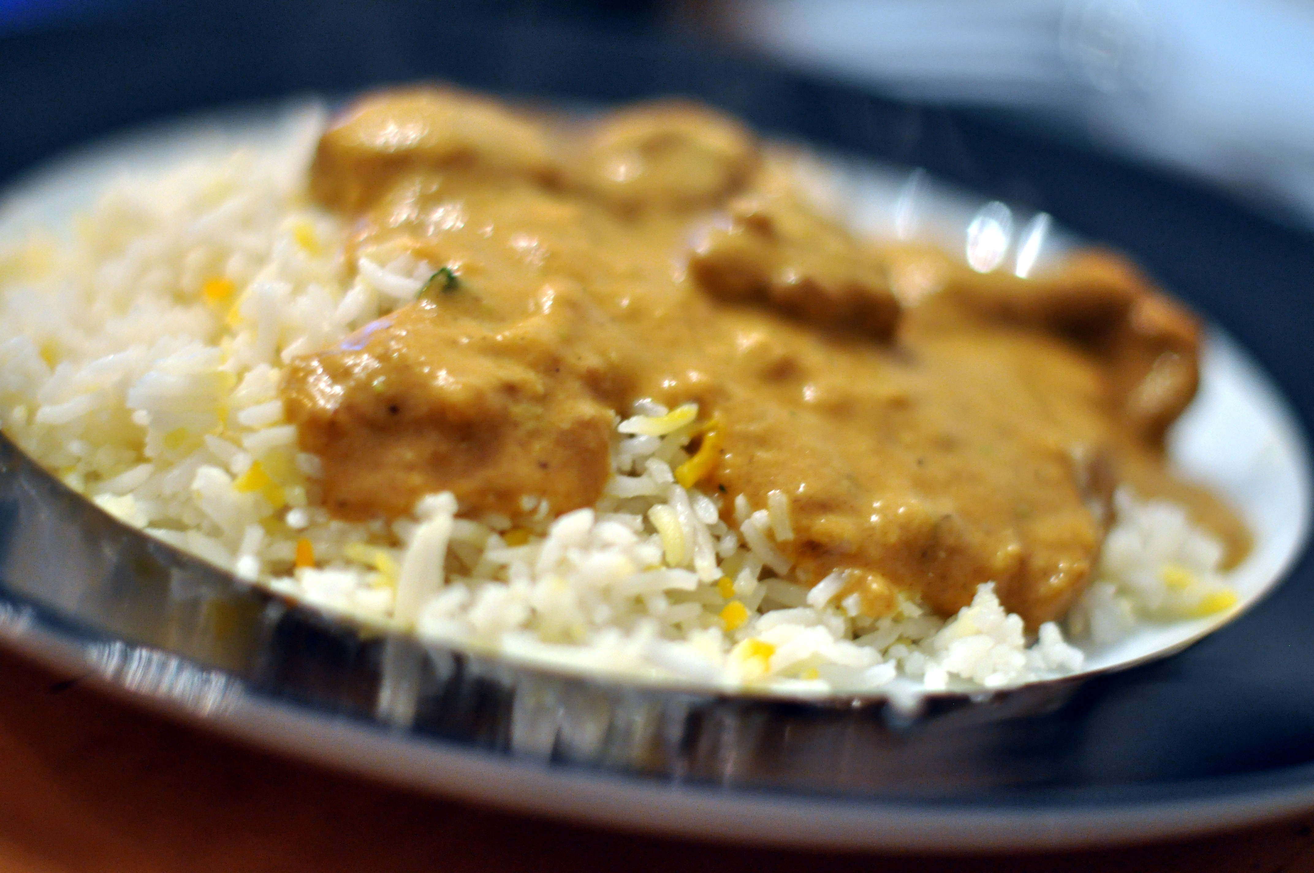 Lamb Korma